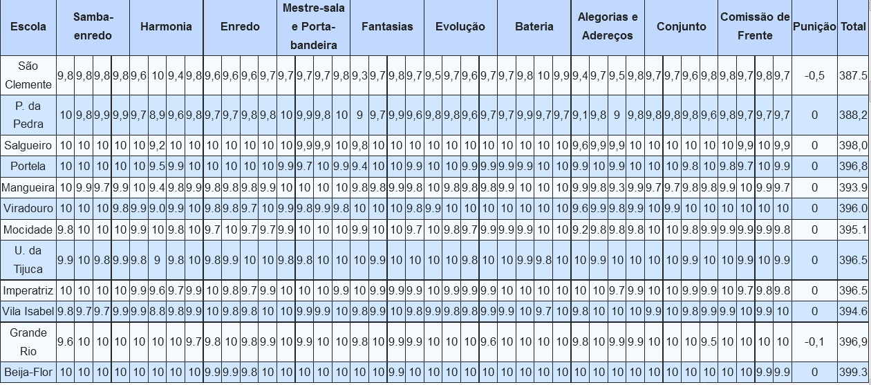 Resultados do Carnaval do Rio - 2008